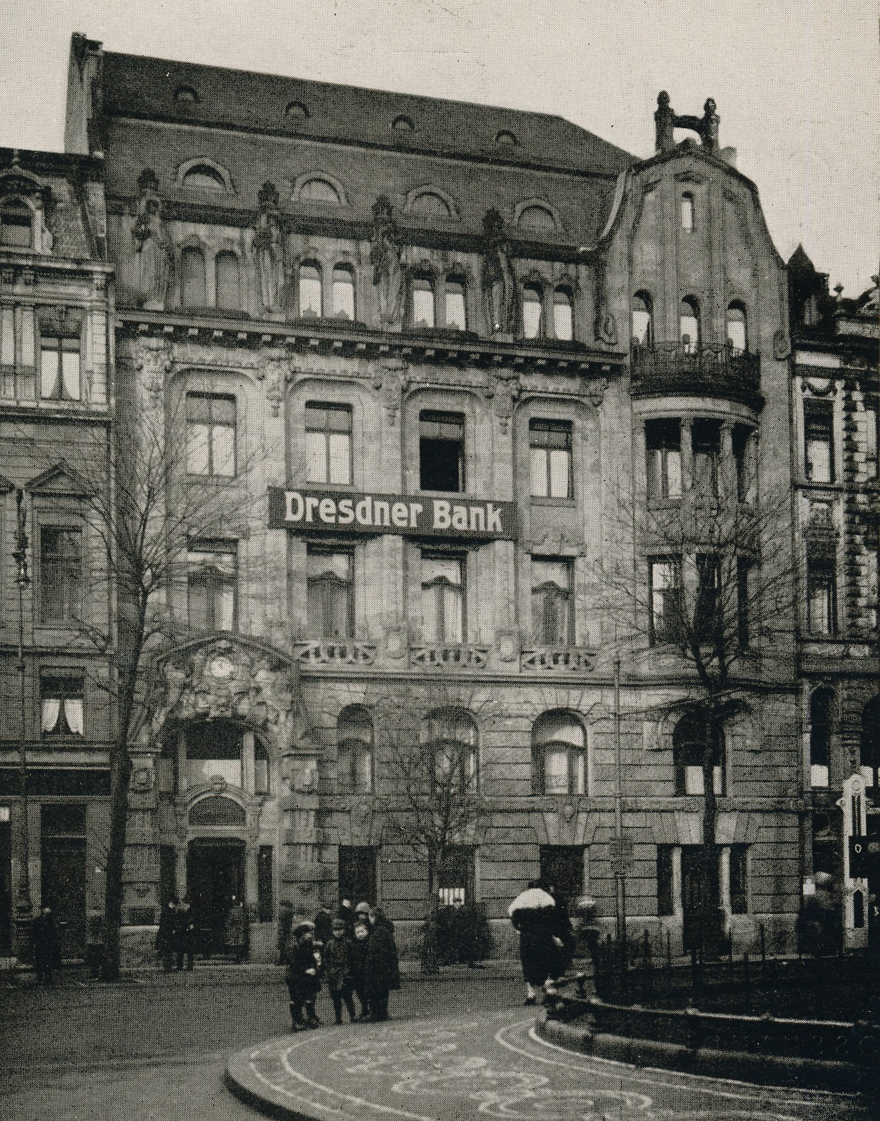 ehem.Villa Klausener, Dresdner Bank, Aachen 1925